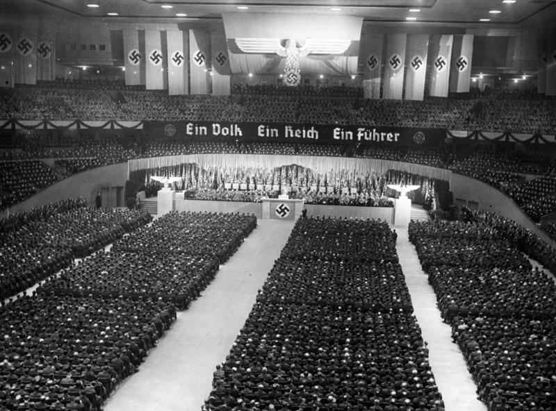 Berlin, Deutschlandhalle, Generalappell Generalappell in der Deutschlandhalle am 23.3.38 Übersicht in der Deutschlandhalle während des Generalappells Fot.: Mü 23.3.38 ADN-Bildarchiv: Deutschland 1938: Generalappell der NSDAP in der Berliner Deutschlandhalle am 23.März 1938 3894-38 [Berlin.- Generalappell, Spruchband: Ein Volk Ein Reich Ein Führer] Information added by Wikimedia users.